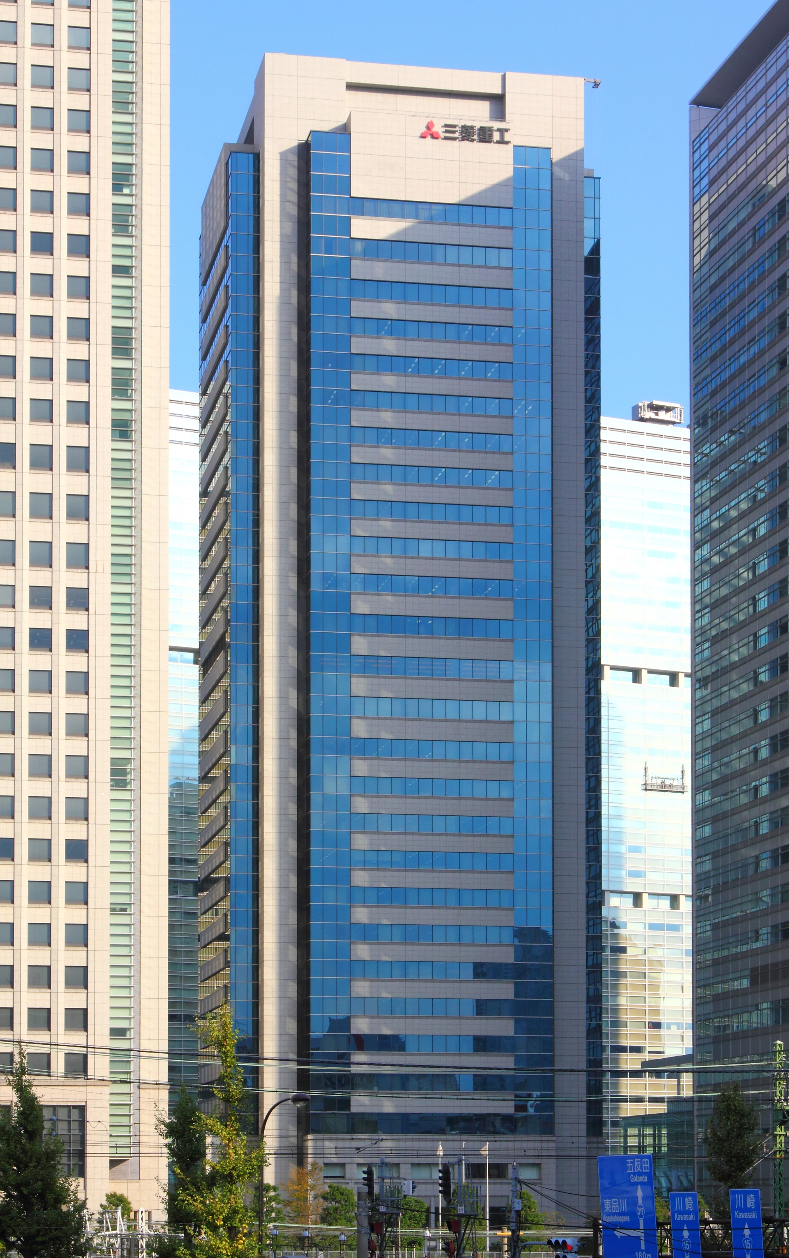 三菱重工本社ビル